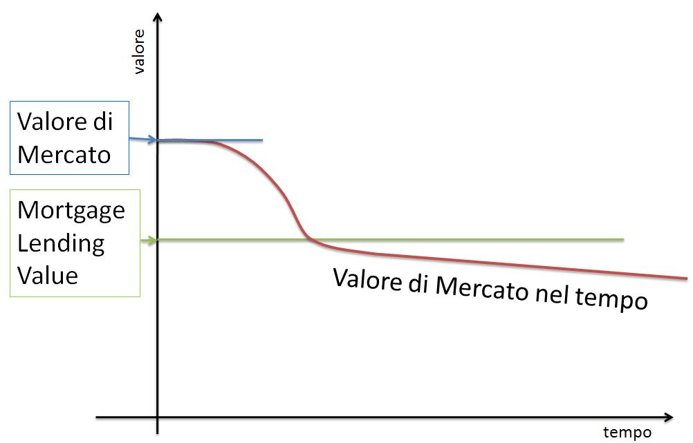 Relazione tra valore di Mercato e Mortgage Lending Value